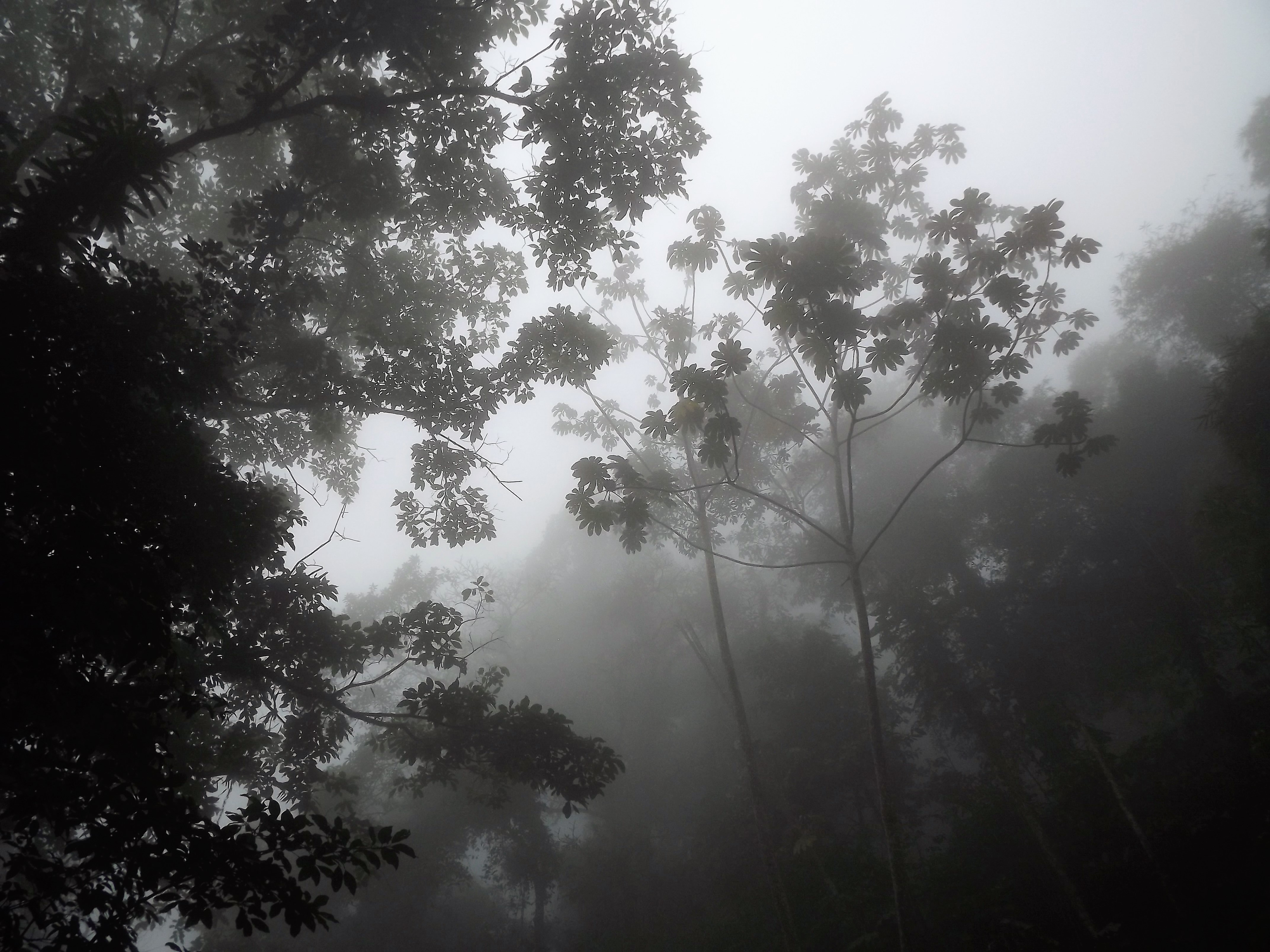 Parque nacional Henri Pittier